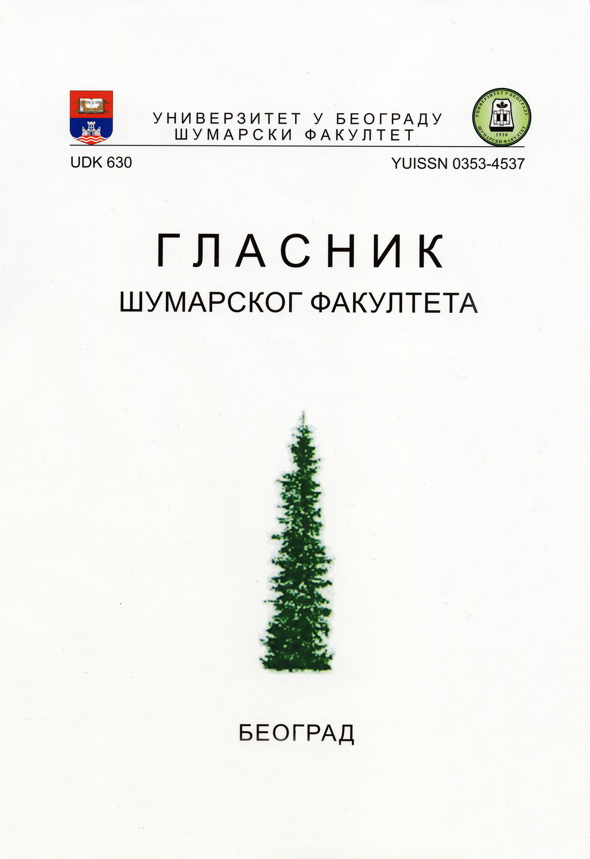 Naslovna strana časopisa Glasnik Šumarskog fakulteta